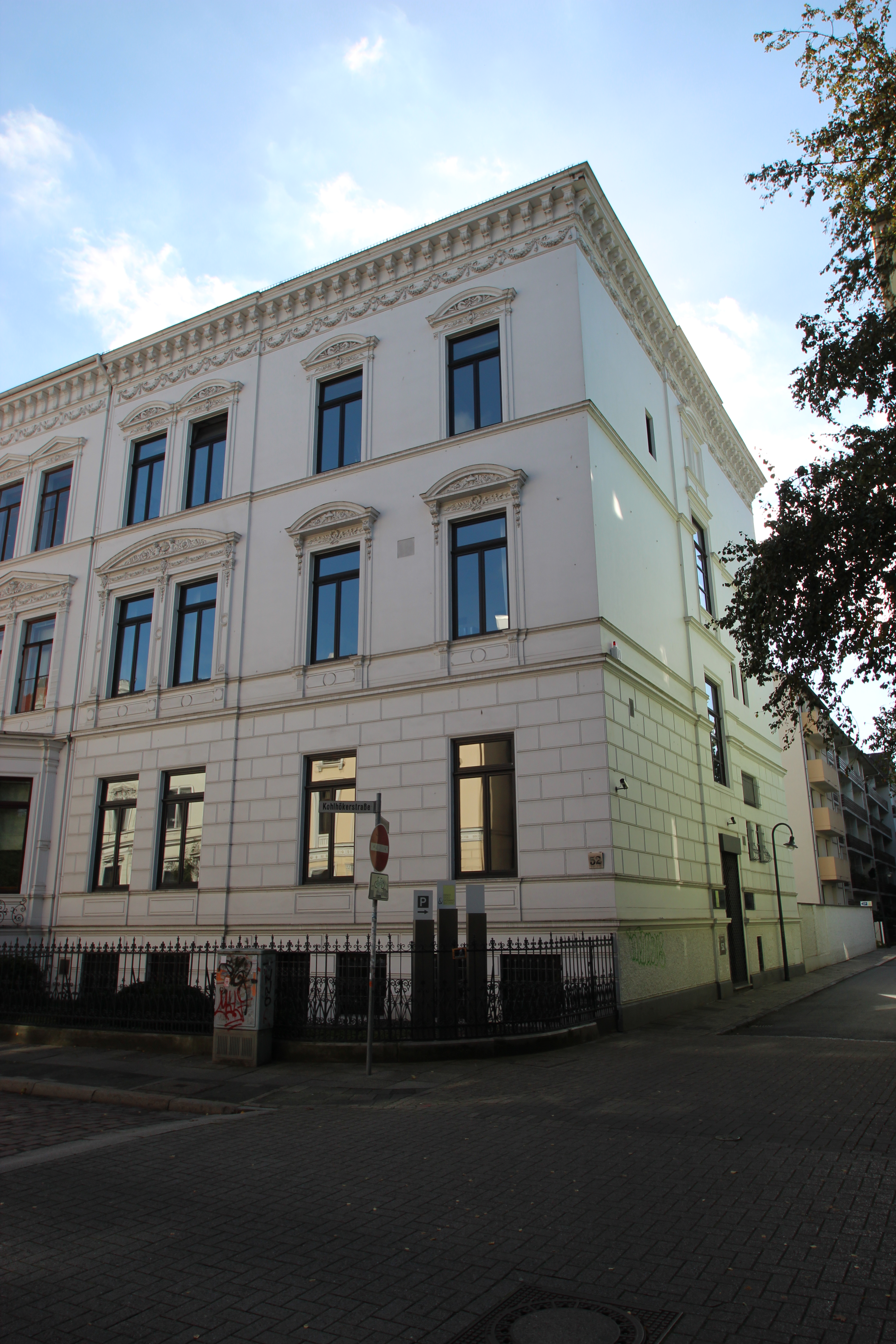 Wohnhaus in Bremen, Kohlhökerstraße 52Das abgebildete Objekt ist ein geschütztes Kulturdenkmal in der Freien Hansestadt Bremen, mit der Nr. 0703 beim Landesamt für Denkmalpflege registriert.